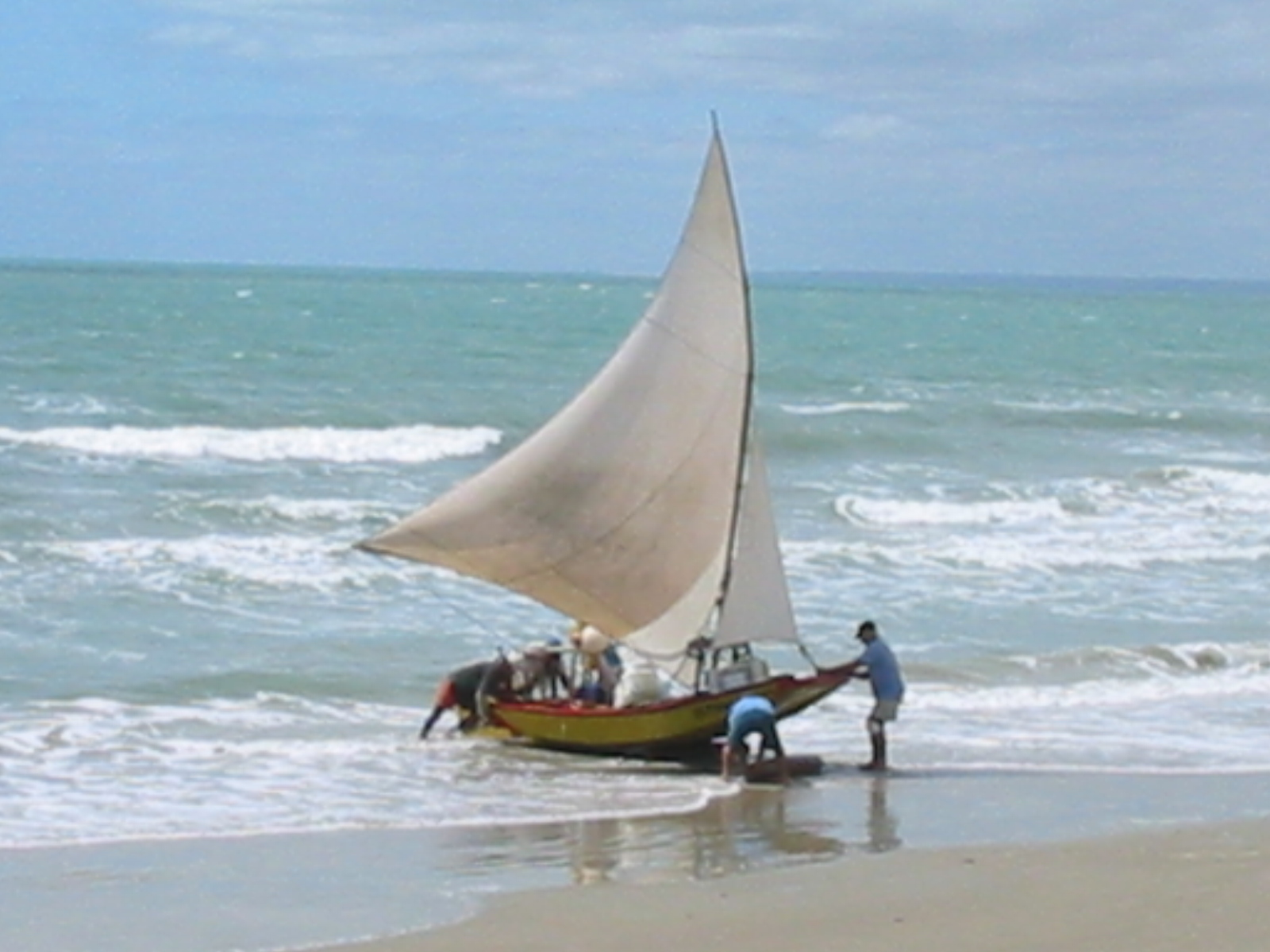 Tibau (Rio Grande do Norte), Brasil. Jangada. Little ship know as jangada. Tibau (Rio Grande do Norte), Brazil.